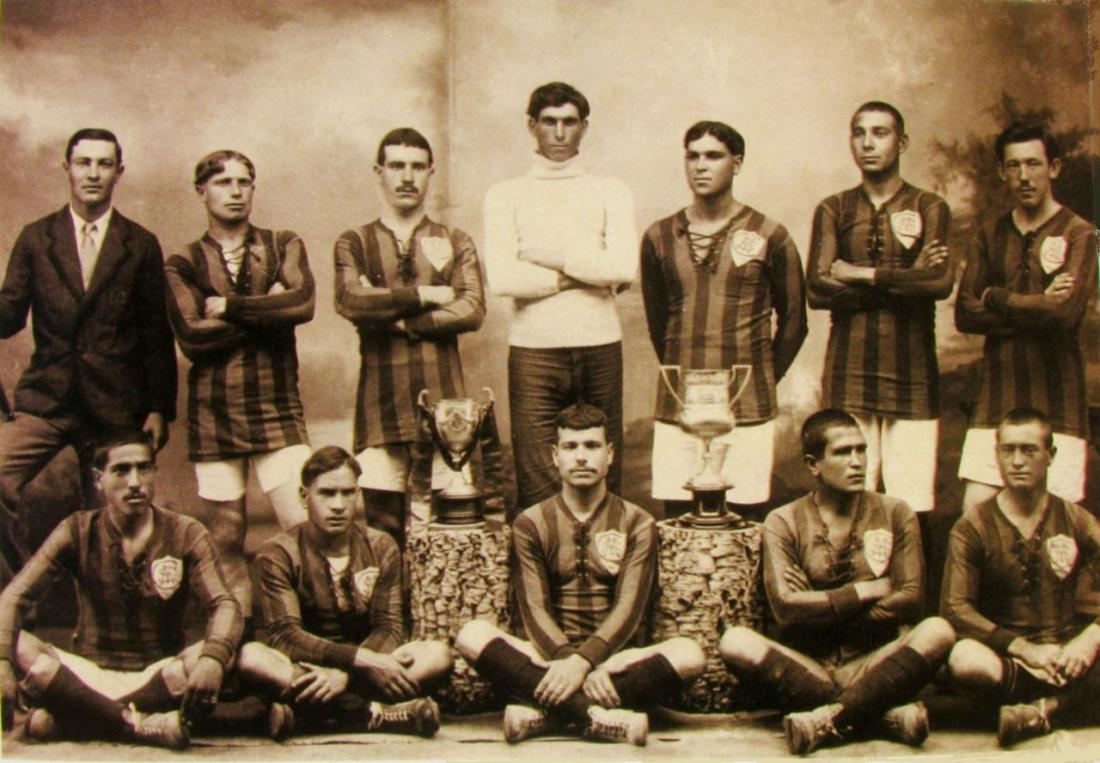 Equipa de futebol do Club Sport Marítimo campeã da Madeira 1916/17. 1º campeonato organizado pela Associação de Futebol do Funchal. De pé, à civil, Gonçalo Gouveia, presidente do Marítimo, Abel Gomes, suplente, Silvestre Rodrigues Russo, João Pimenta Galhudo, José Rodrigues Barrinhas, João Mota e Albin Yud; sentados, Francisco Vieira, António Castro, Cornélio Silva, Luís Gouveia Feijão e José de Sousa